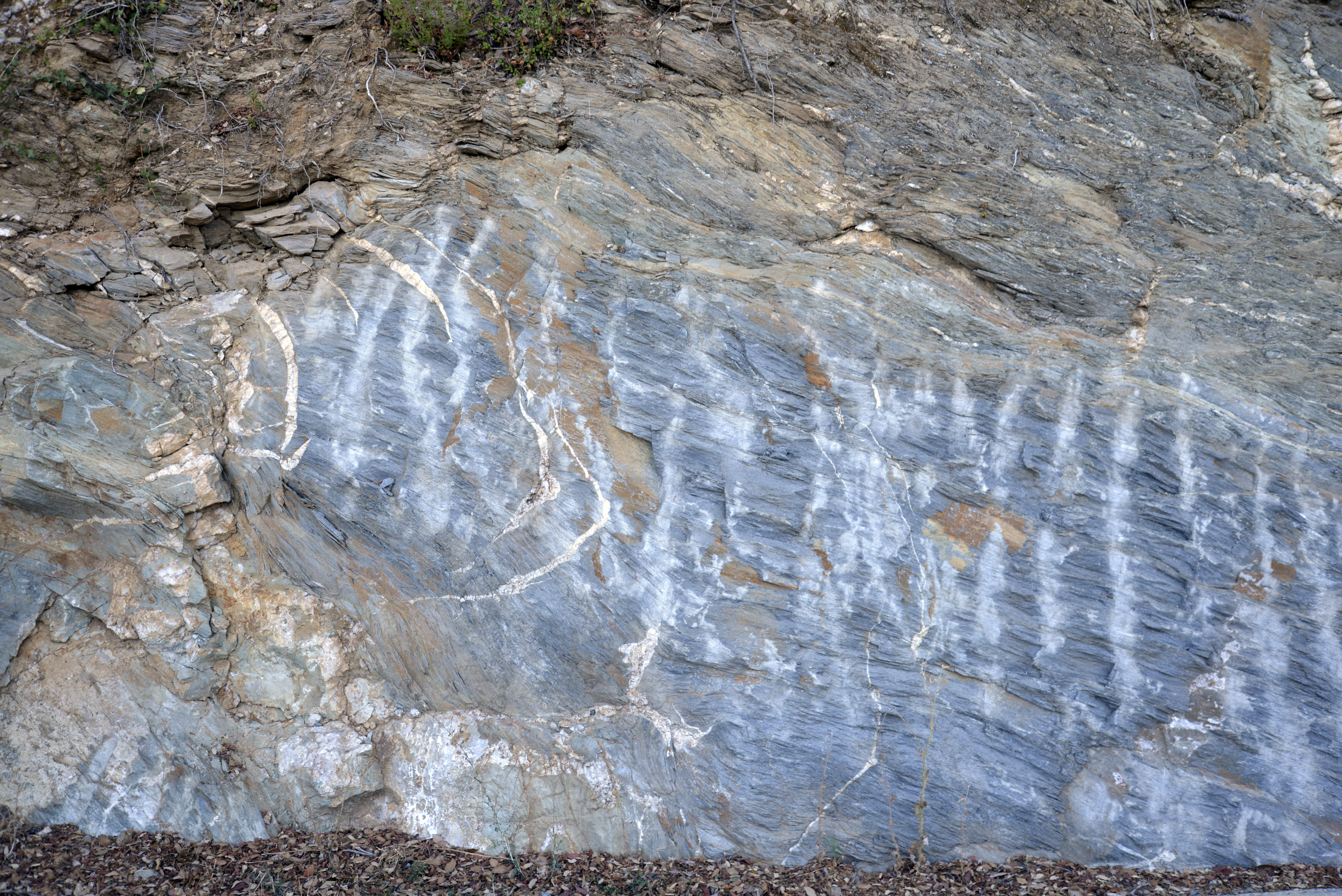 Piano, Castagniccia (Haute-Corse) - Paroi schisteuse de la route D237 au pied de Penta Frescaja (1114 m) au sud-ouest du village.